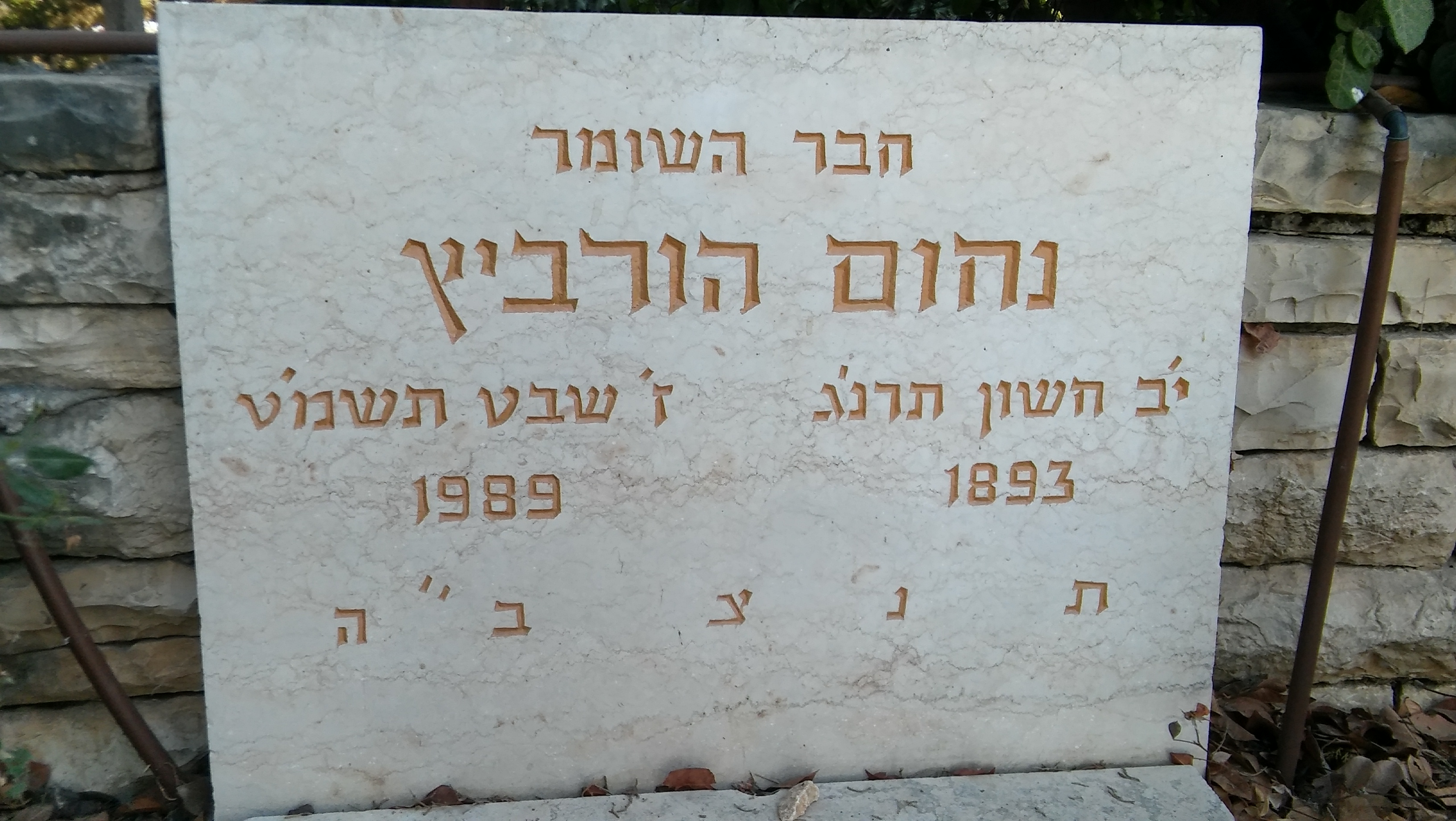 קברו של נחום הורביץ בחלקת השומר בבית הקברות של כפר גלעדי